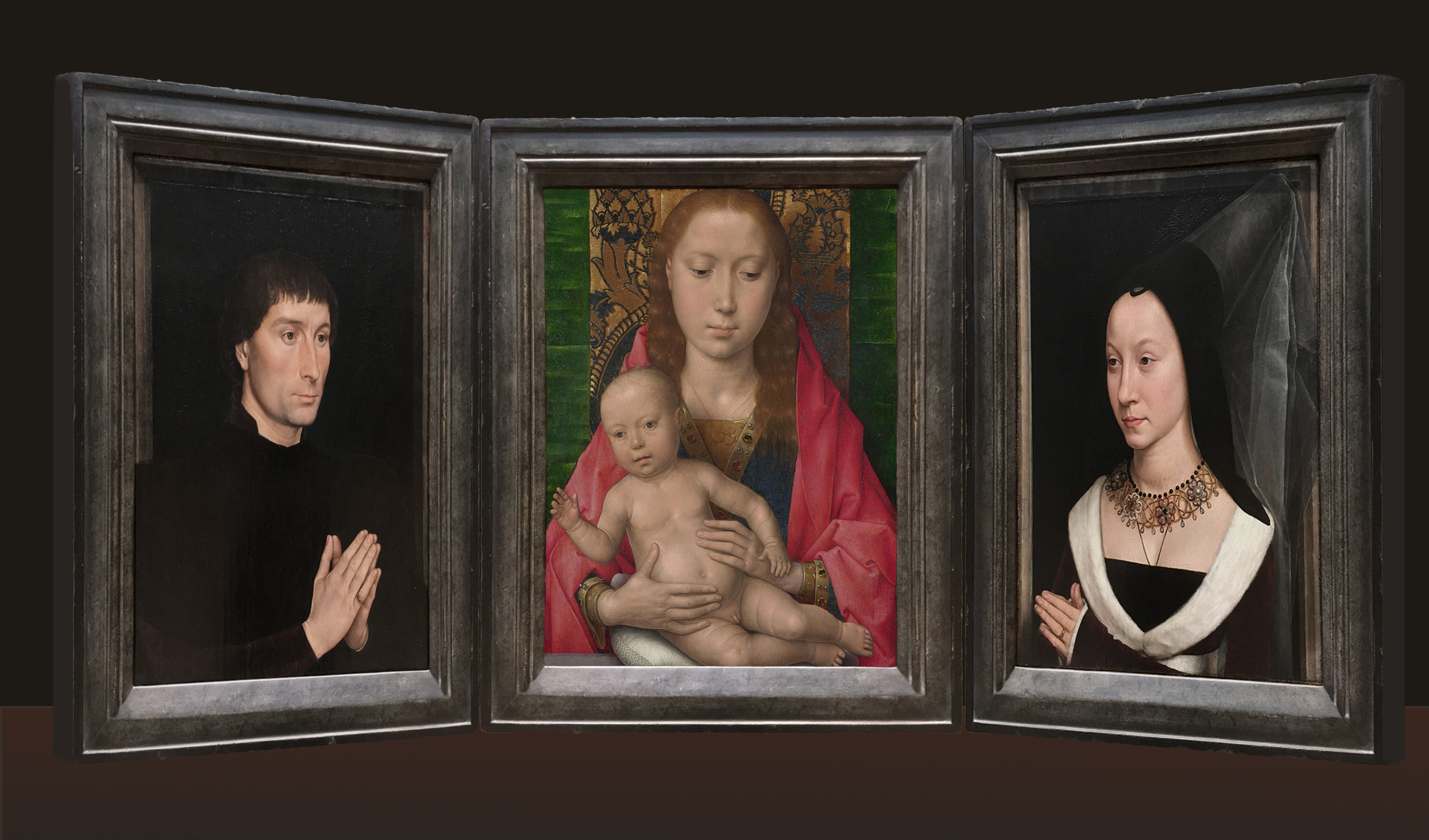 Painting; Paintings